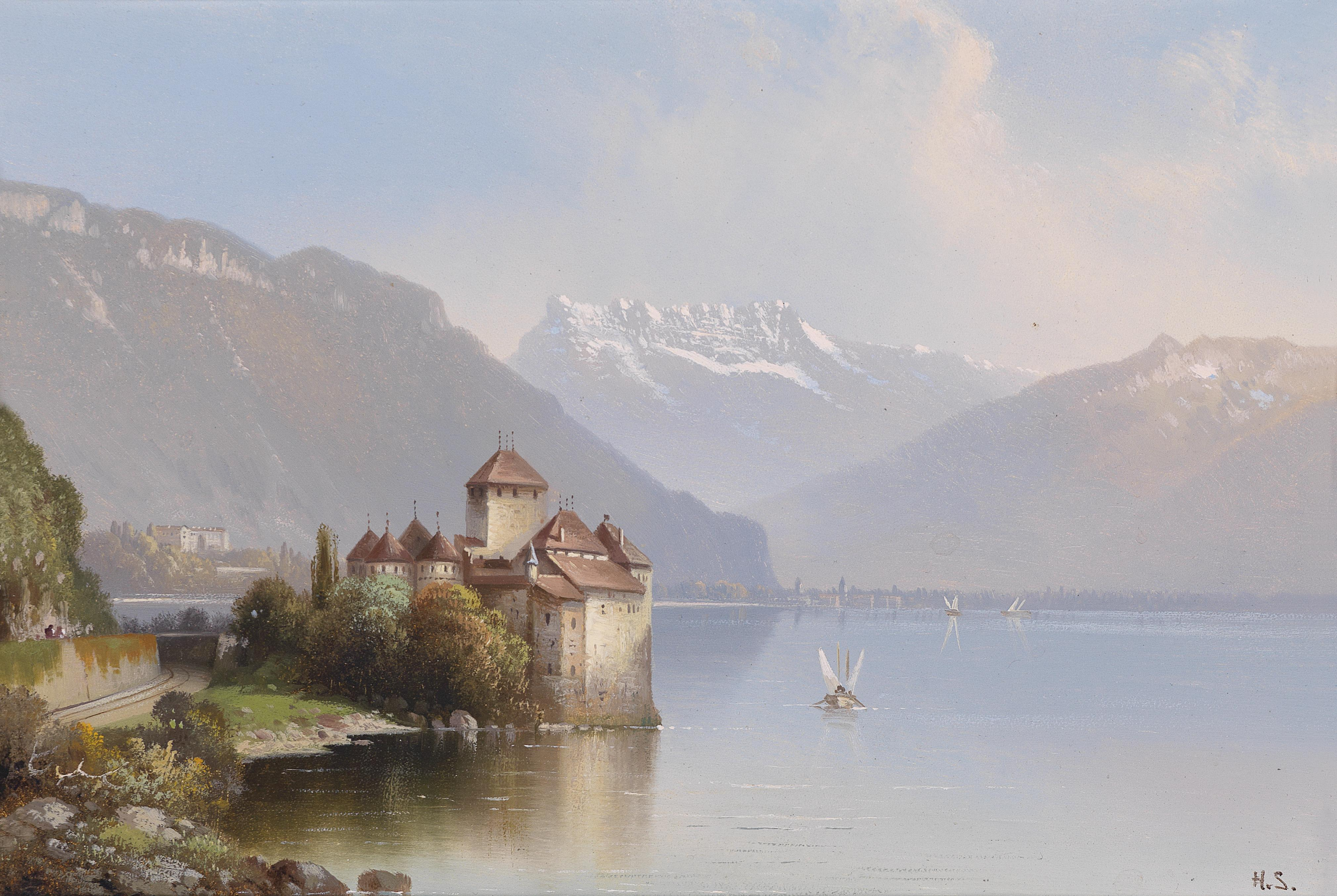 Blick auf Schloss Chillon am Genfer Seetitle QS:P1476,de:"Blick auf Schloss Chillon am Genfer See" label QS:Lde,"Blick auf Schloss Chillon am Genfer See"